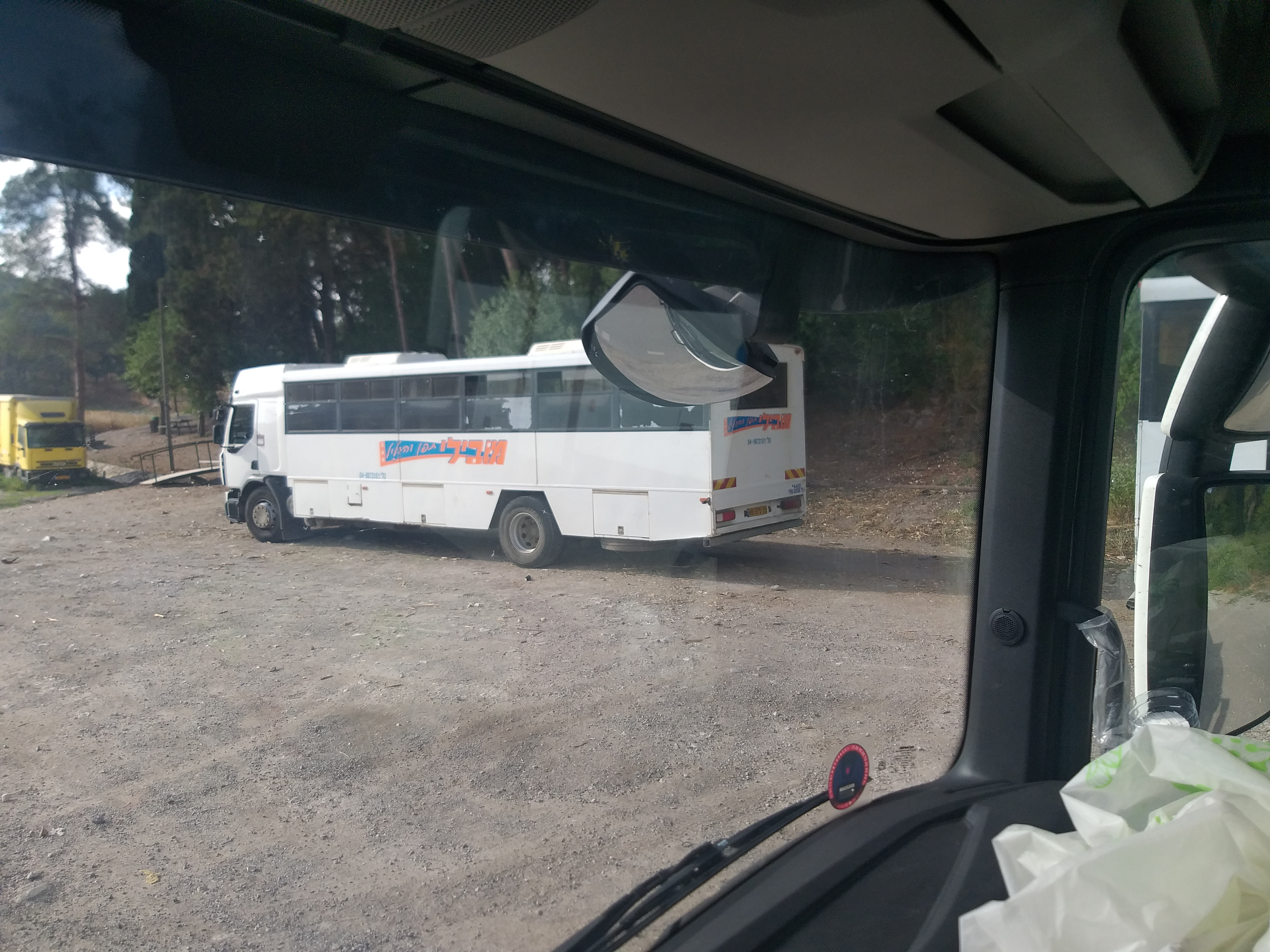 טיולית מובילי תפן והגליל אימון 2020